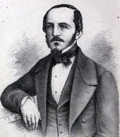 Leyendas nacionales / por don Salvador Sanfuentes. Santiago de Chile : [s.n.], 1885. 335 p.